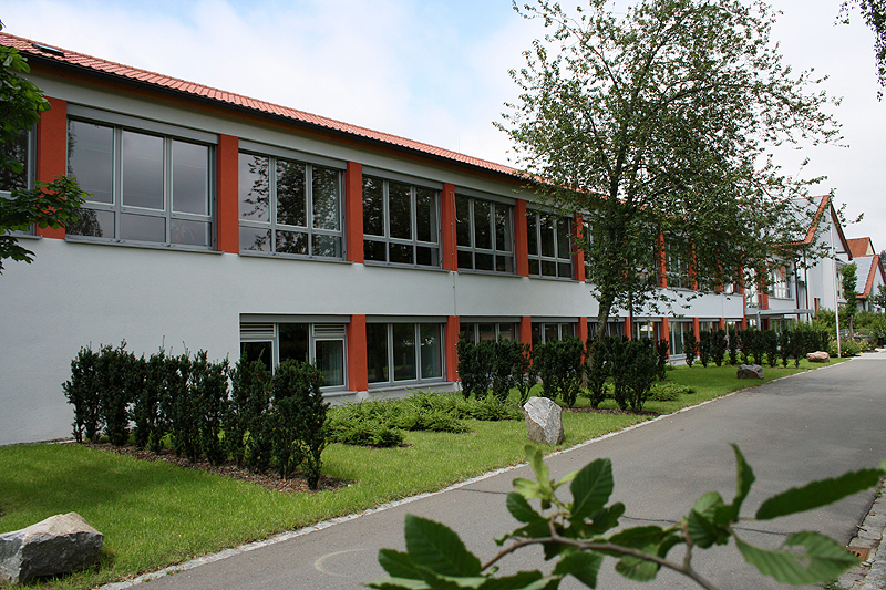 Berufsfachschule für Musik Sulzbach-Rosenberg